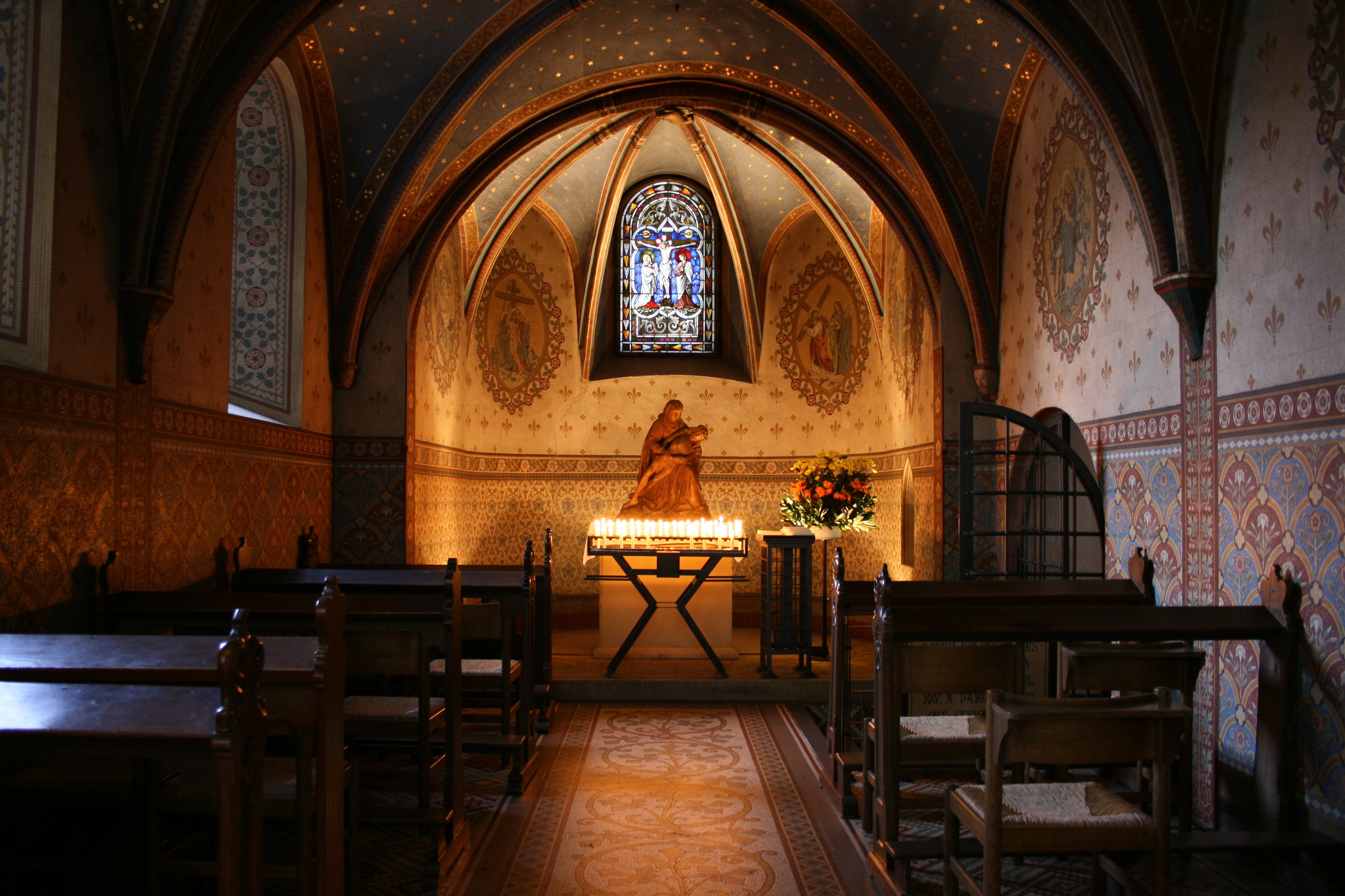 Sankt Martini in Emmerich am Rhein